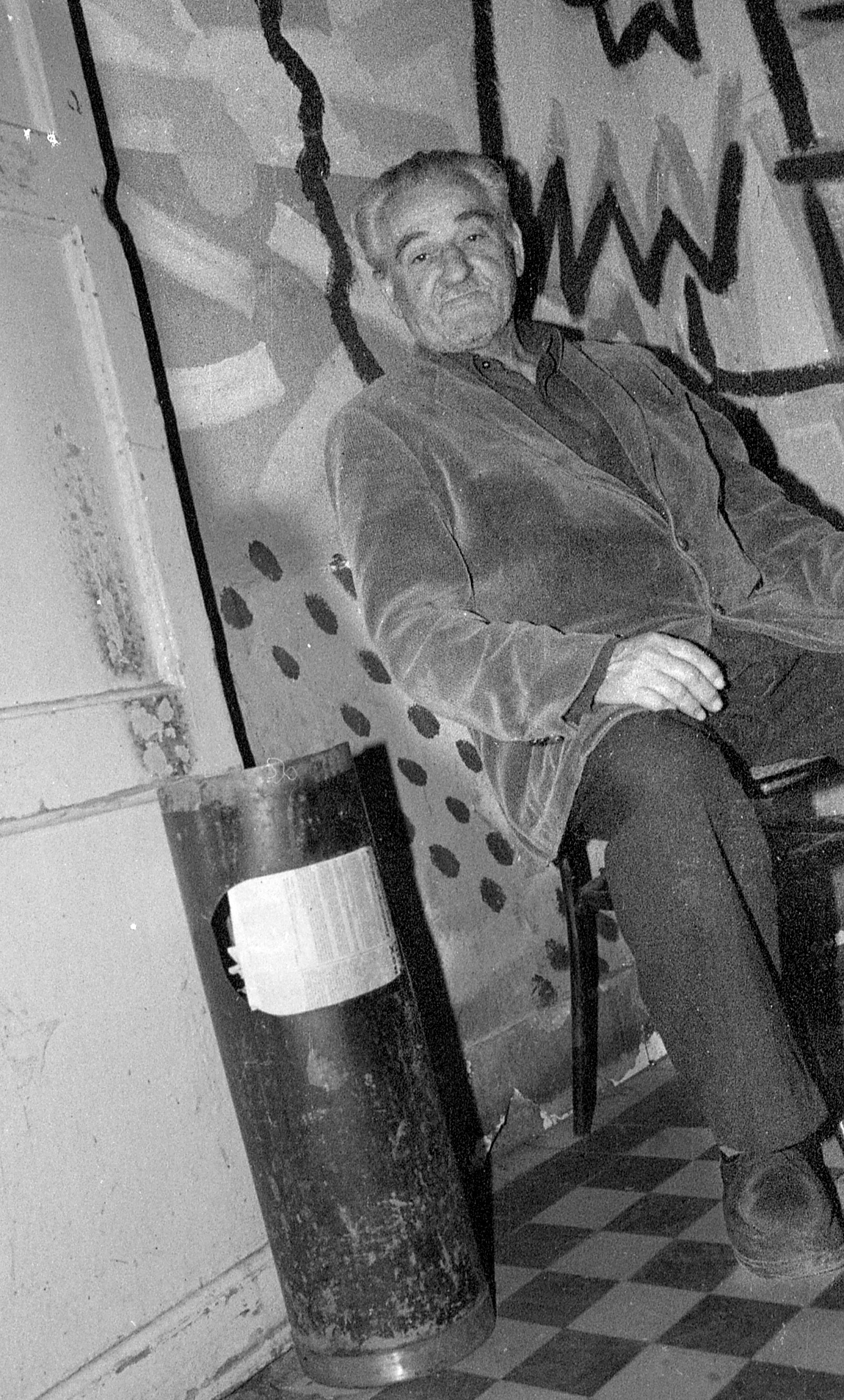 Цига, легендарни вратар КСТ-а, снимио Ранко Томић 1995.